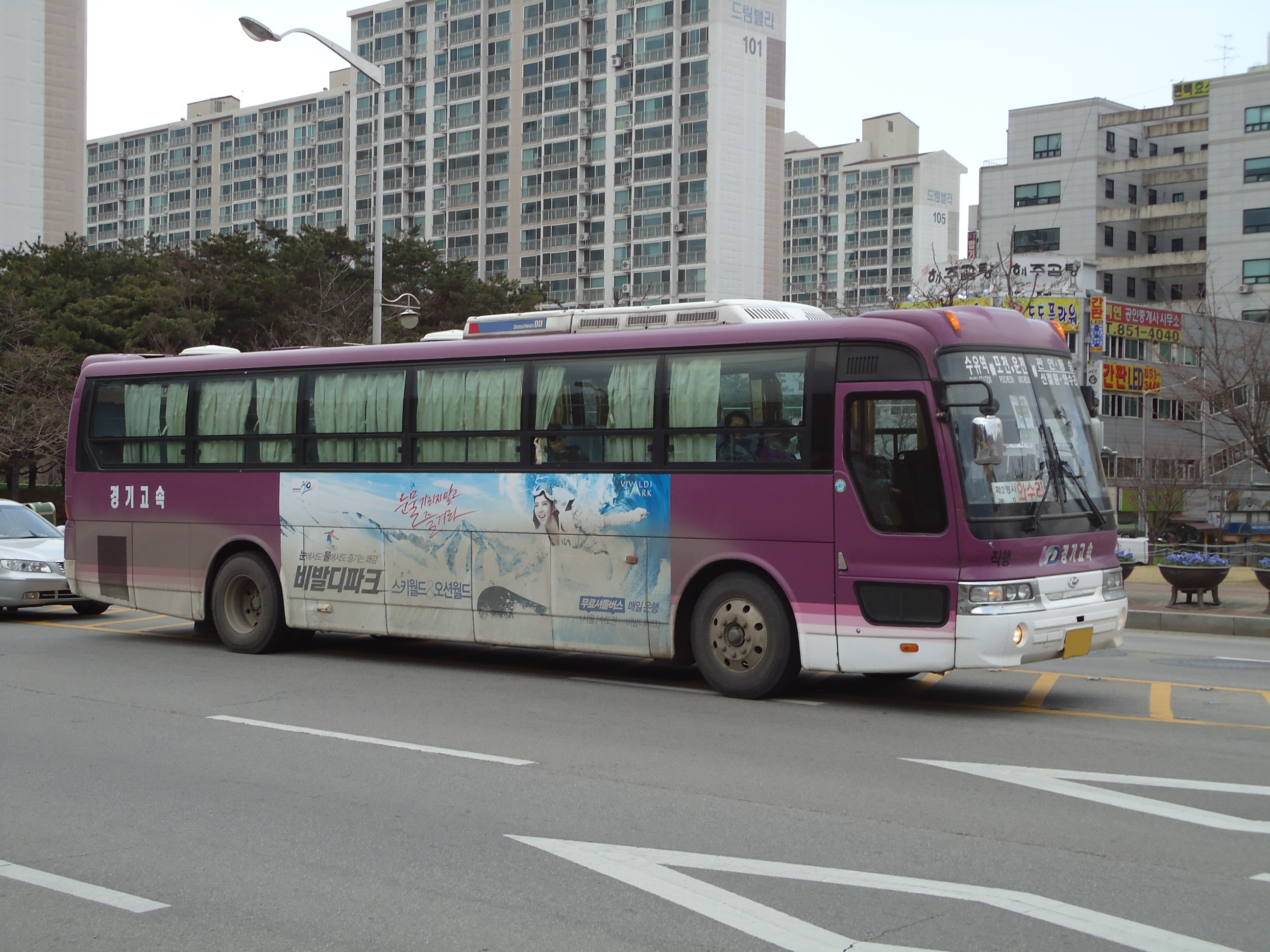 경기고속 3005번 에어로 스페이스 LS(구 선진고속 출신)